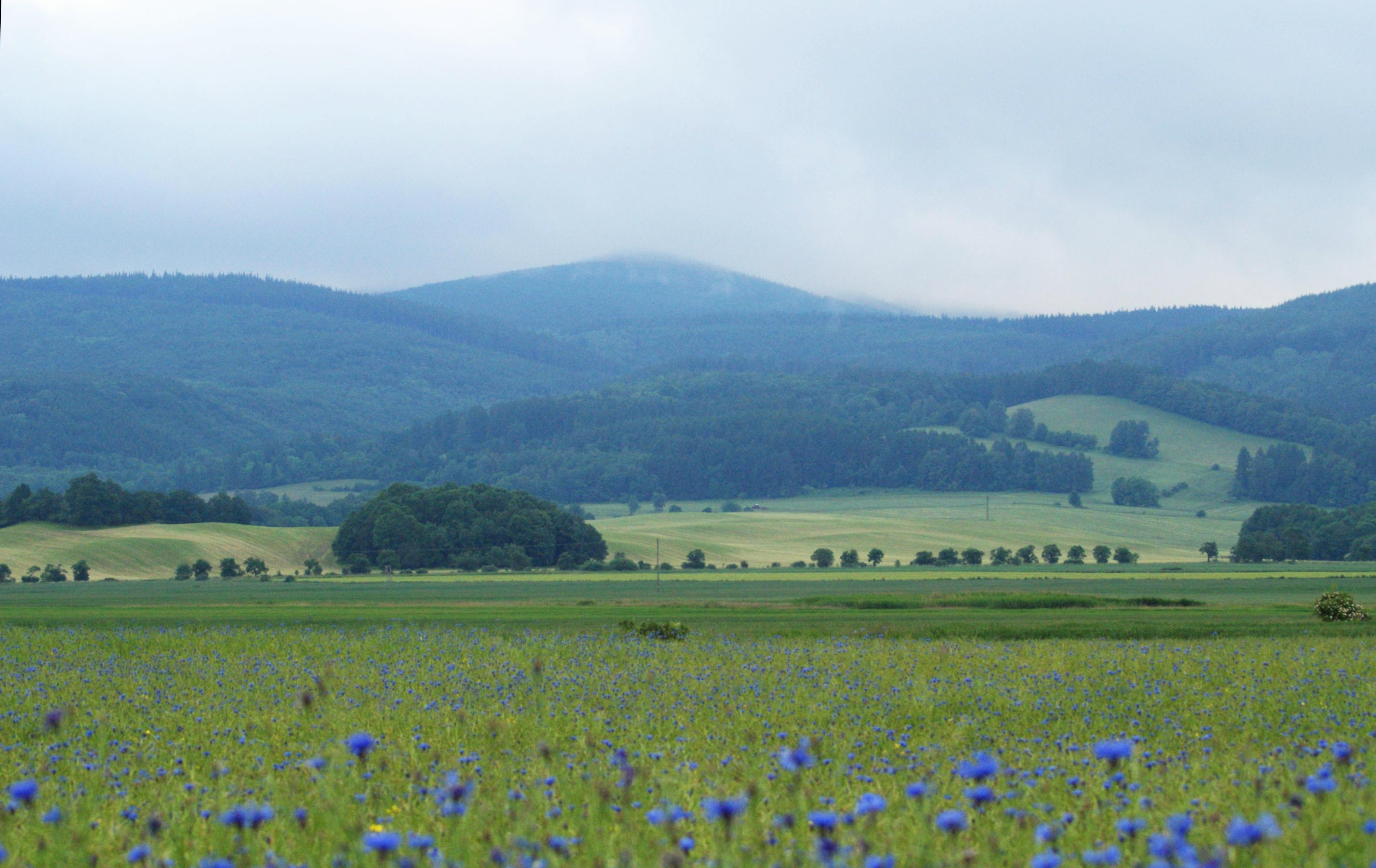 Borówkowa - widok z Kamienicy